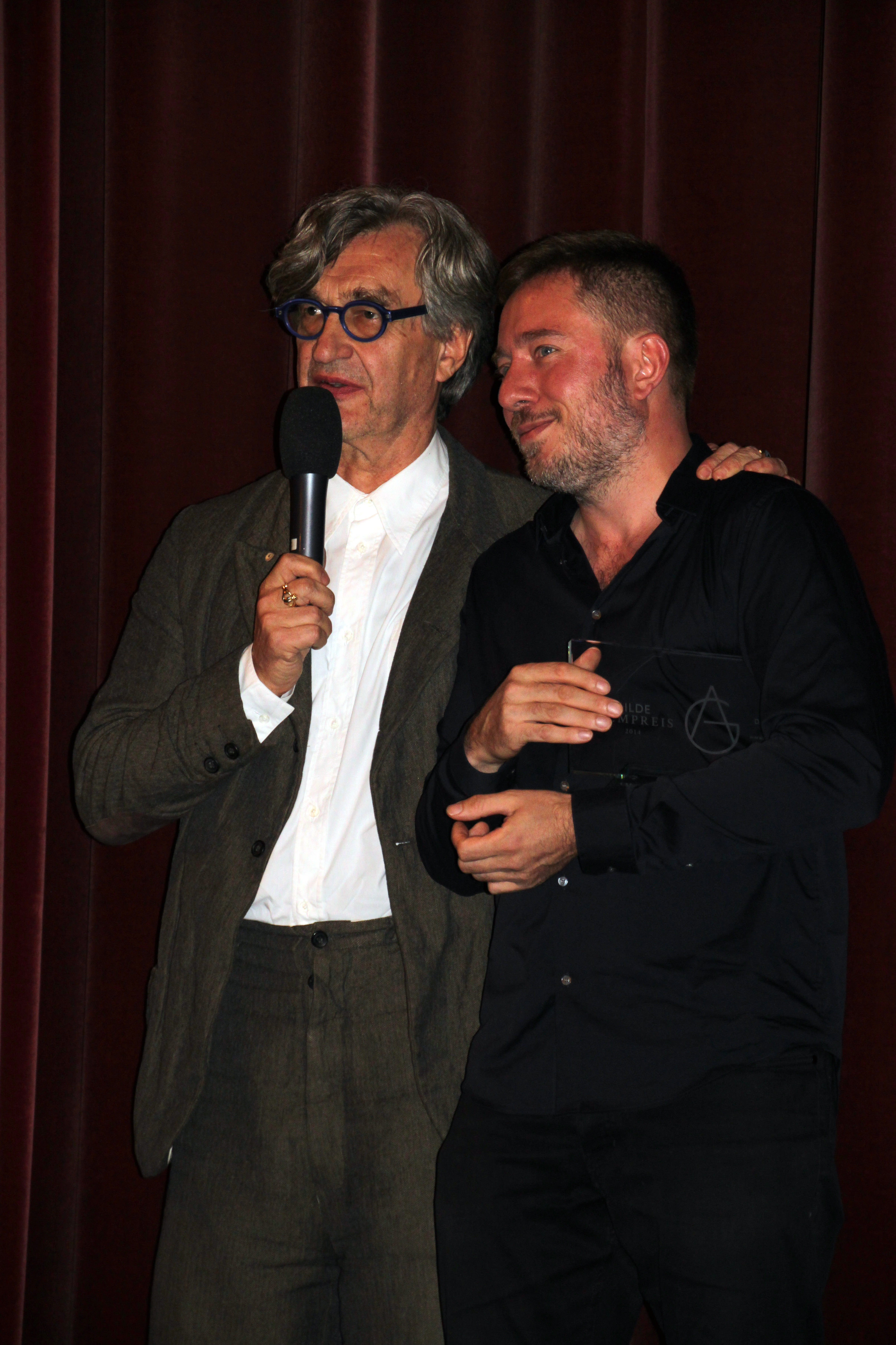 Wim Wenders und Juliano Ribeiro Salgado - Das Salz der Erde- Friends & Family-Screening Berlin, Delphi Palast, 30.10.2014